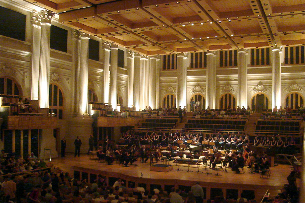 Sala São Paulo inside Júlio Prestes Station, Brazil